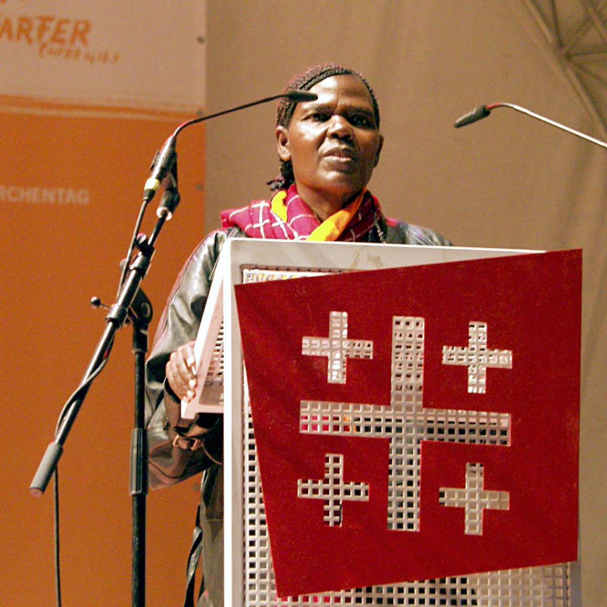 Dr. Agnes Abuom, Exekutivausschuss Ökumenischer Rat der Kirchen, Nairobi/Kenia, auf dem Deutschen Evangelischen Kirchentag 2007 während der Veranstaltung „Die Macht der Würde: Globalisierung neu denken. Ruf an den G8-Gipfel in Heiligendamm“.